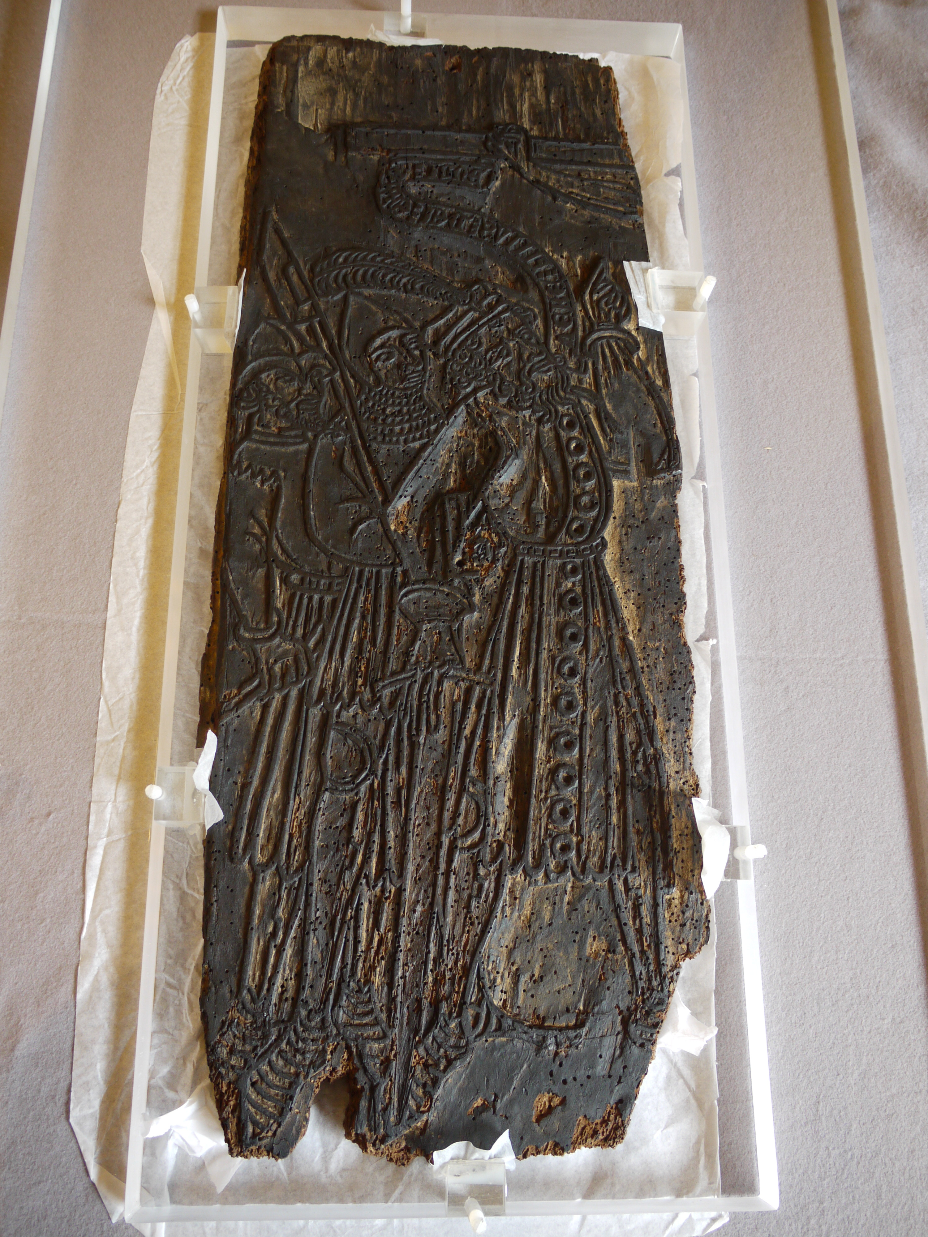 Côté Crucifixion